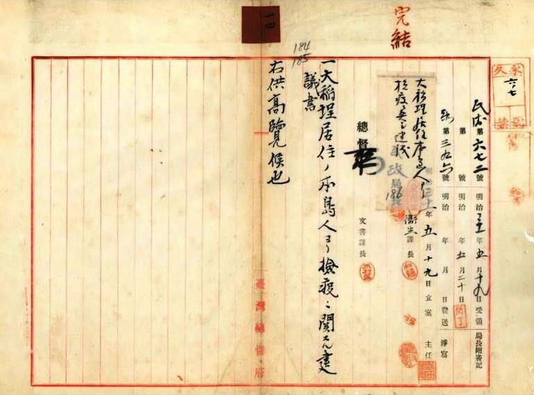 明治31年（1898年）5月大稻埕當地商對日本政府的檢疫方法提出建議書